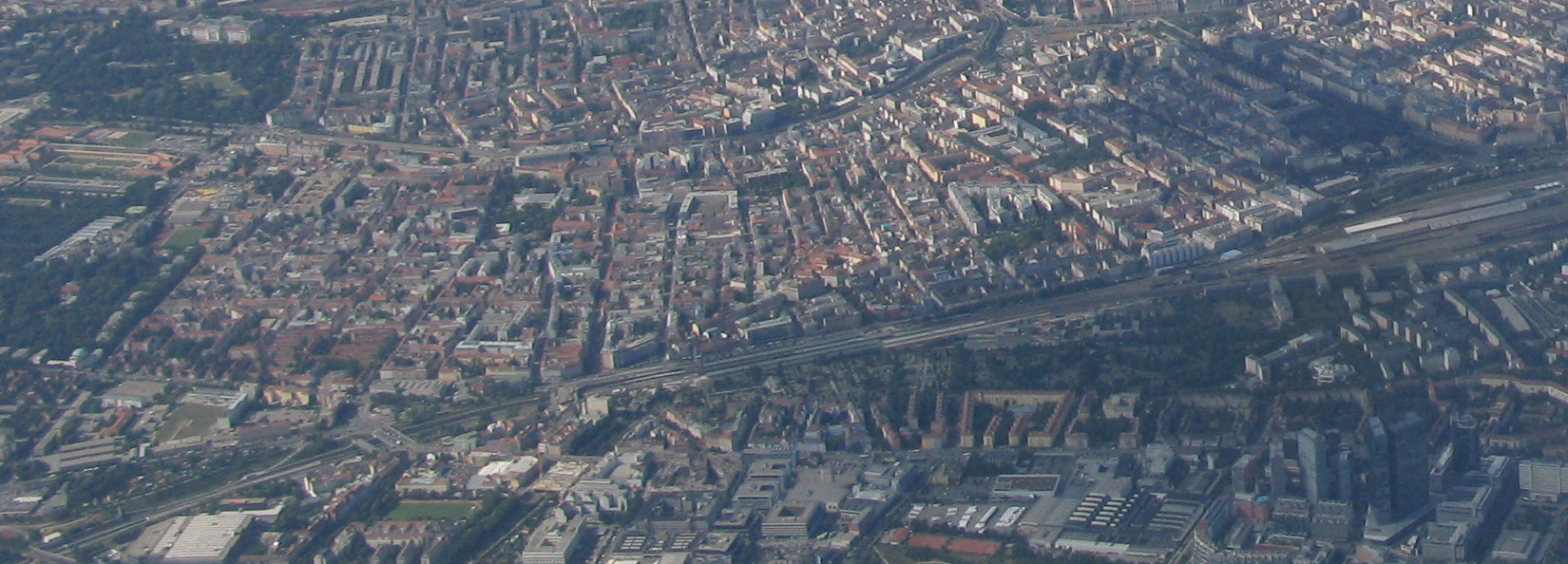 Meidling, Vienna, Austria